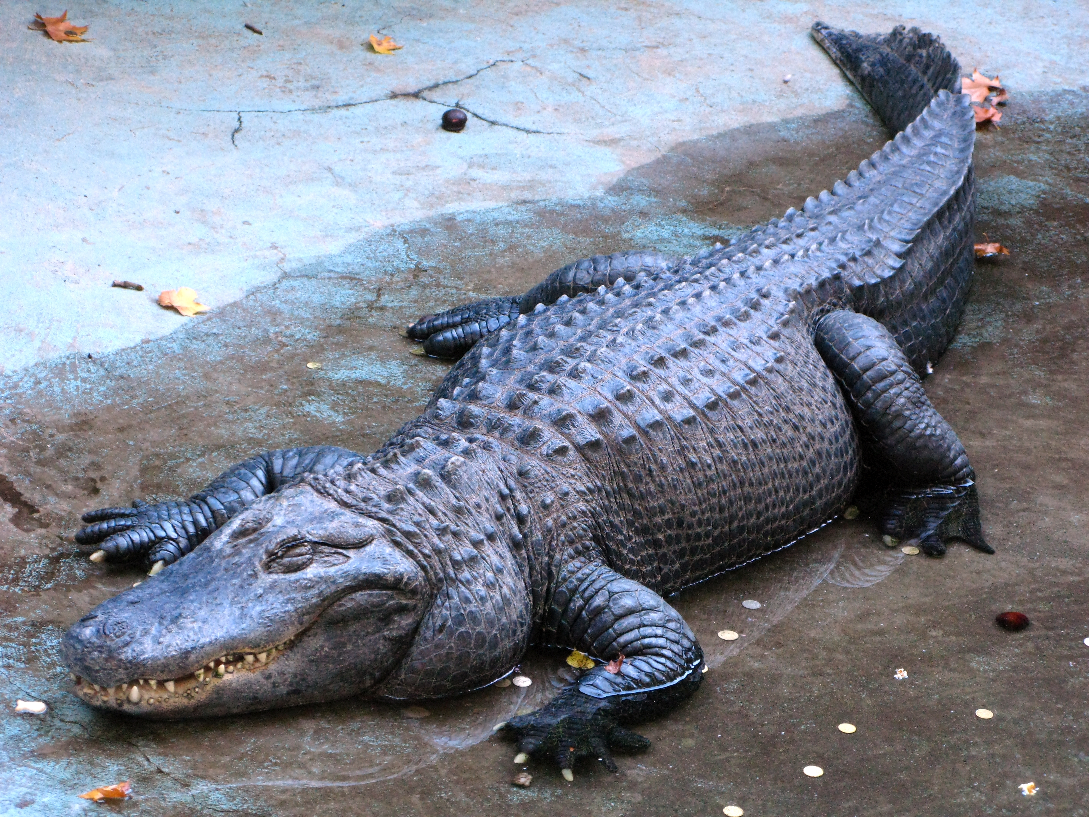 Aligator Muja in Belgrade Zoo, Serbia.